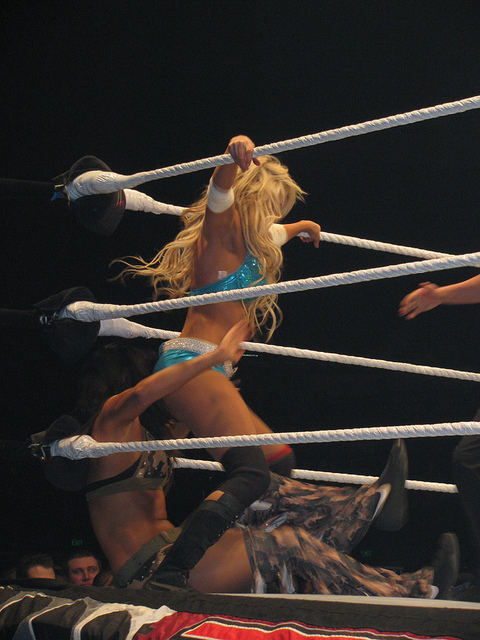 Kelly Kelly exécutant une Stink Face.